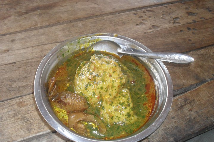 Pâte de manioc à la sauce Gombo